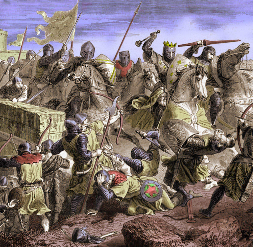 La bataille de Taillebourg, dans Histoire de l'armée française, Paul Lehugeur.